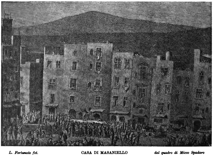 La casa di Masaniello in una riproduzione ottocentesca dal quadro di Micco Spadaro (alias Domenico Gargiulo).